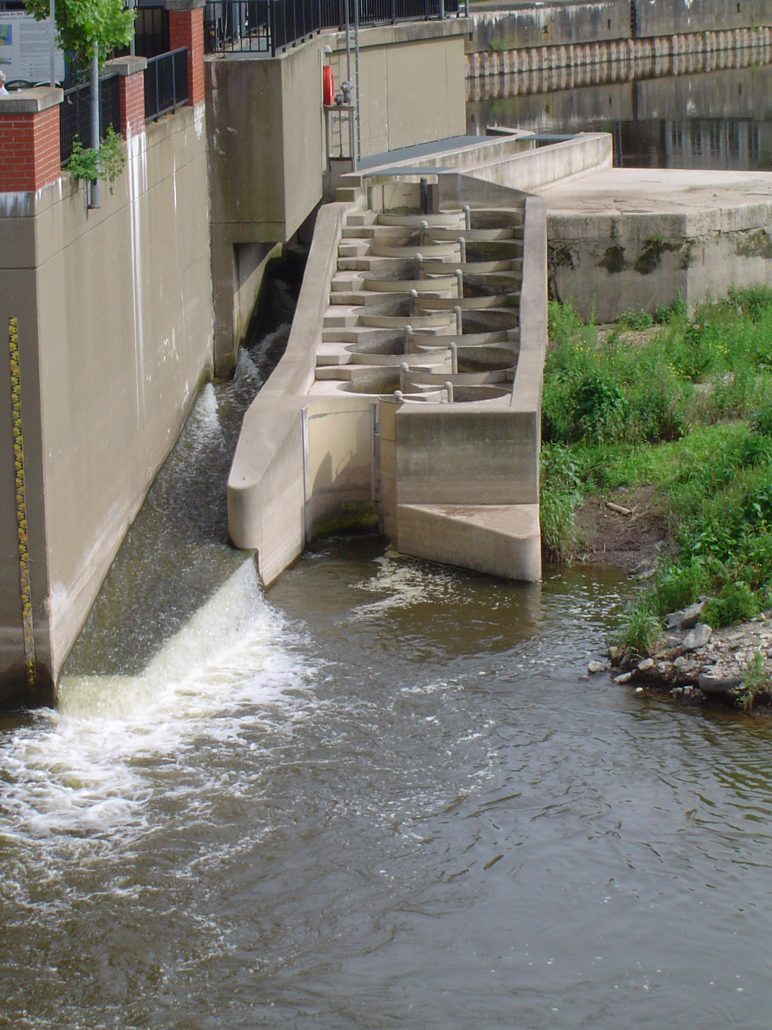 Mäanderfischpass-Anlage an der Pfortmühle in Hameln, Niedersachsen